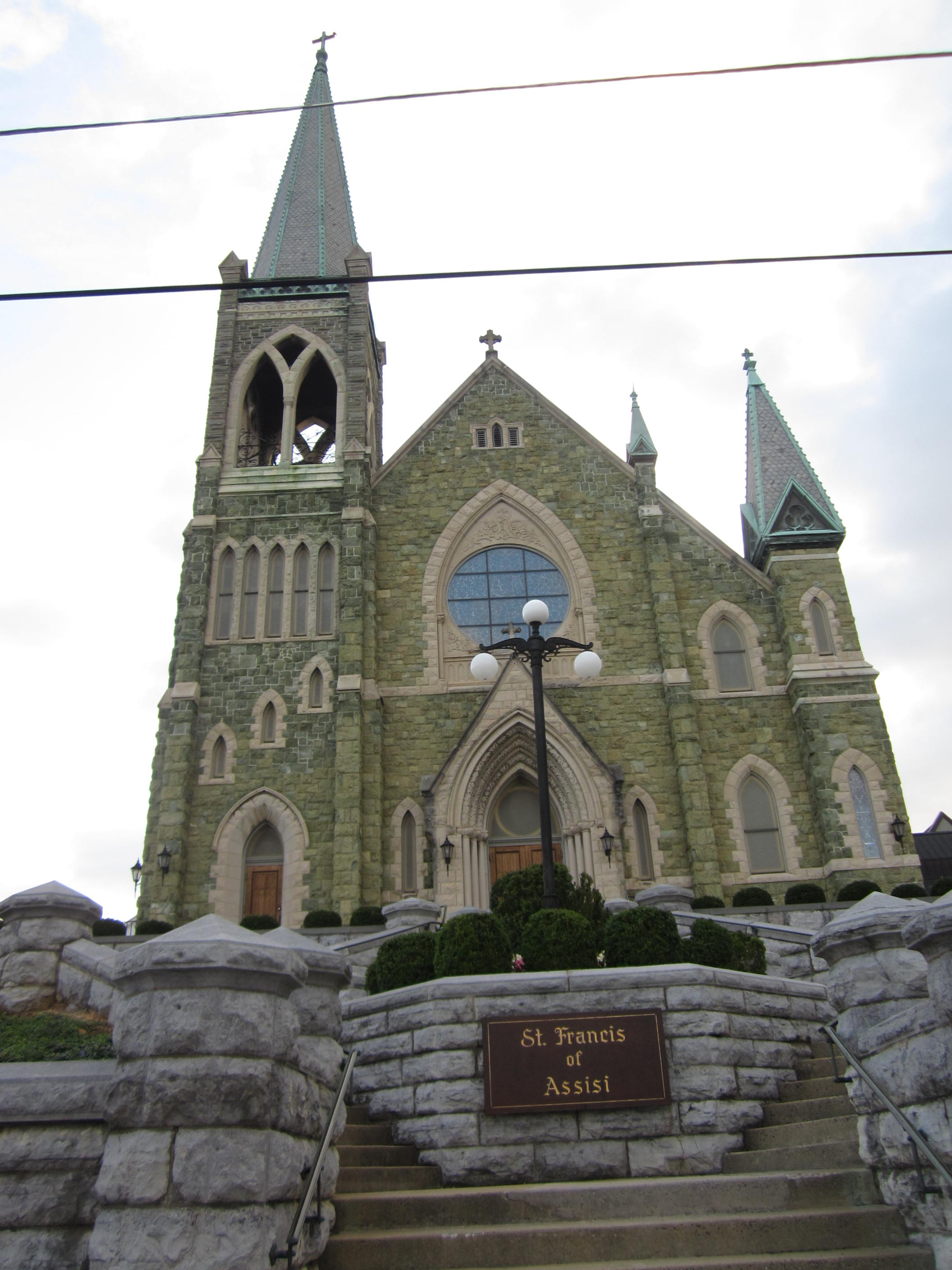 Staunton, Virginia